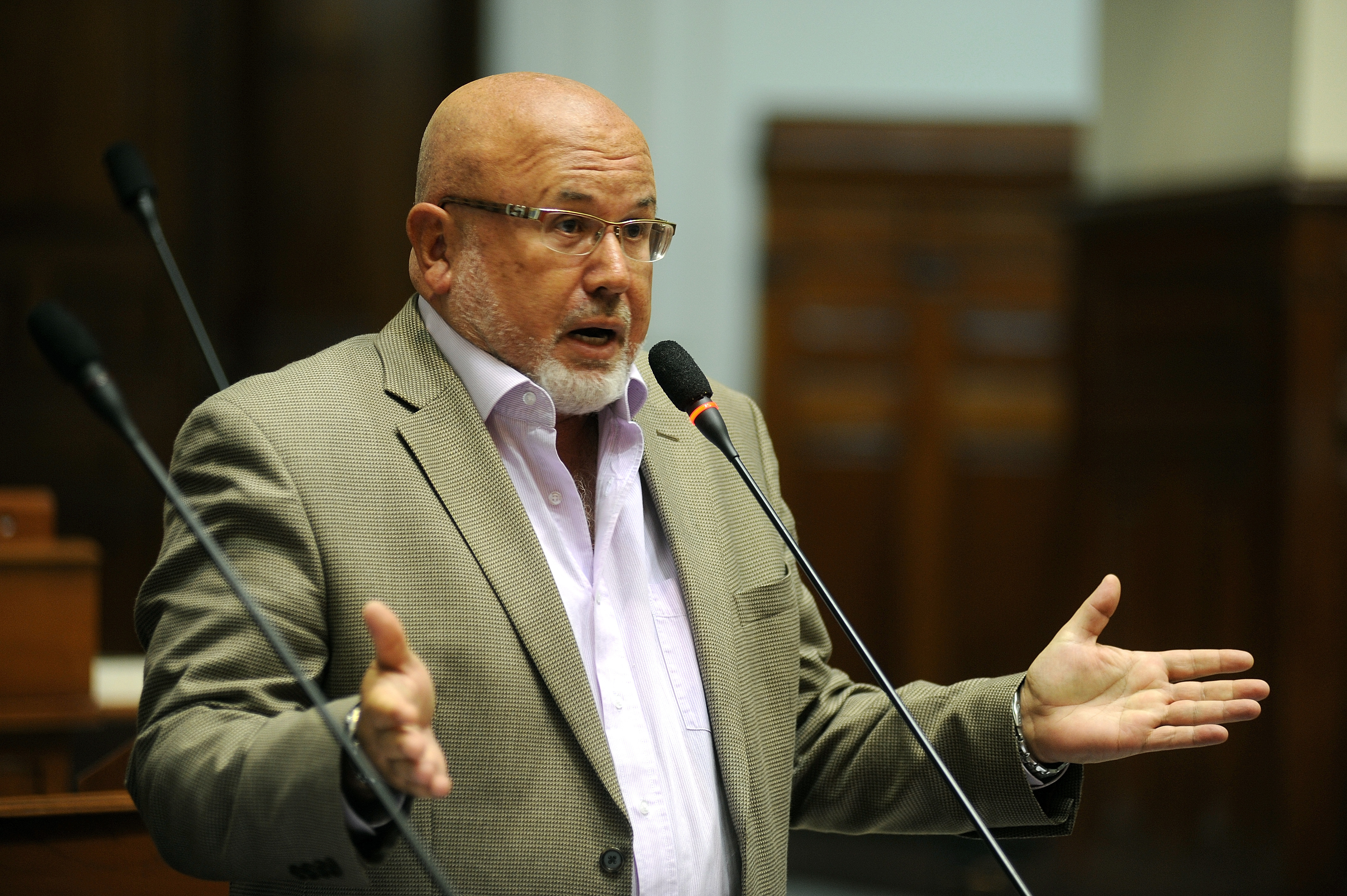 El congresista Carlos Bruce Monte de Oca fija su posición en el debate parlamentario realizado esta tarde por el Pleno.